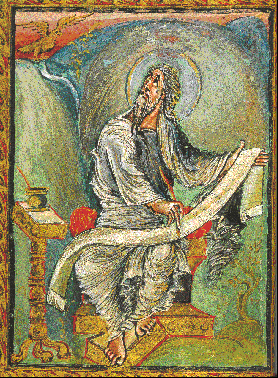 Carolingian manuscript, 820-830, Municipal Library, Epérnay, France Latin=Ioannes, English=John